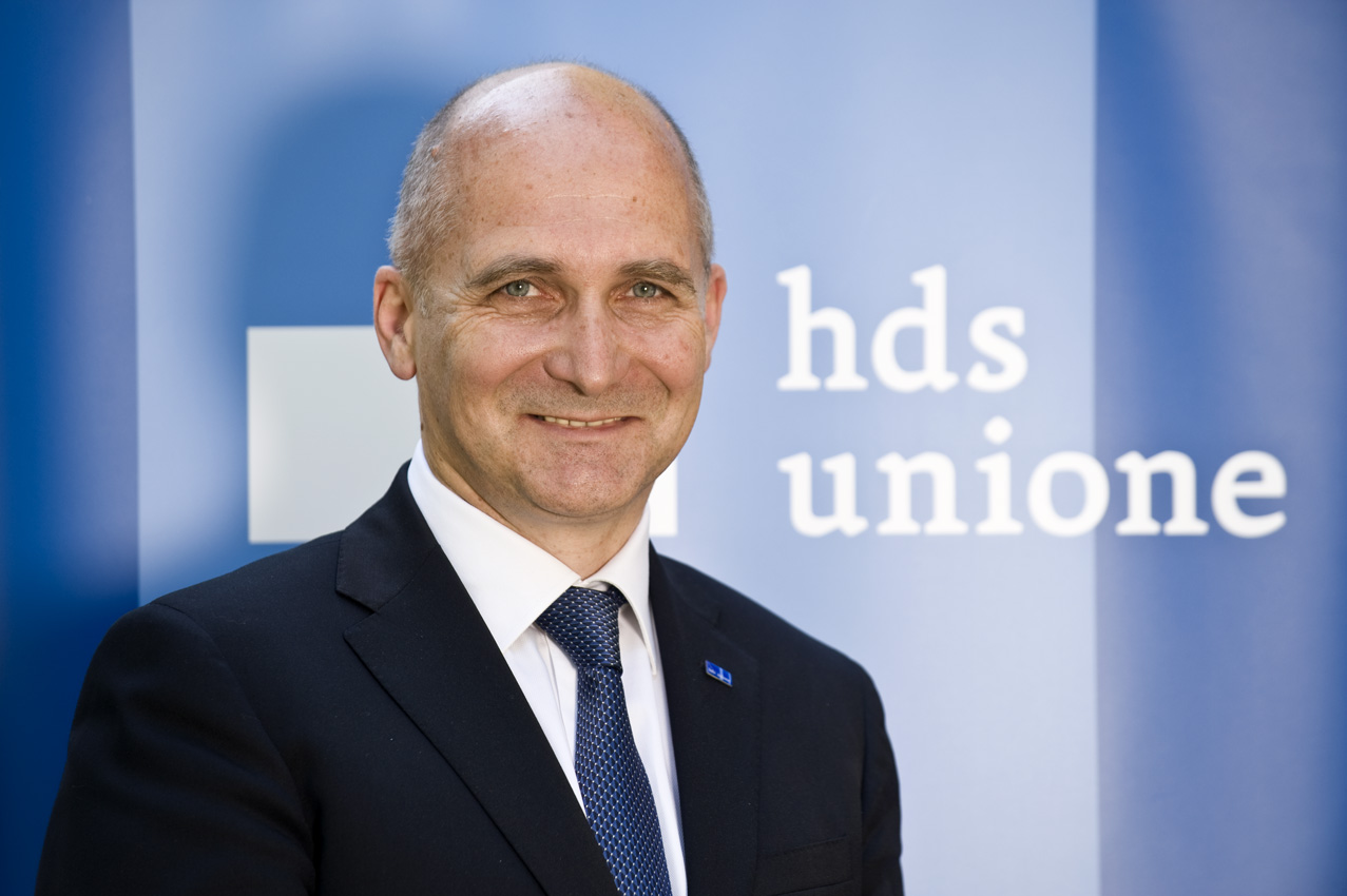 Walter Amort, attuale presidente dell'Unione commercio turismo servizi Alto Adige